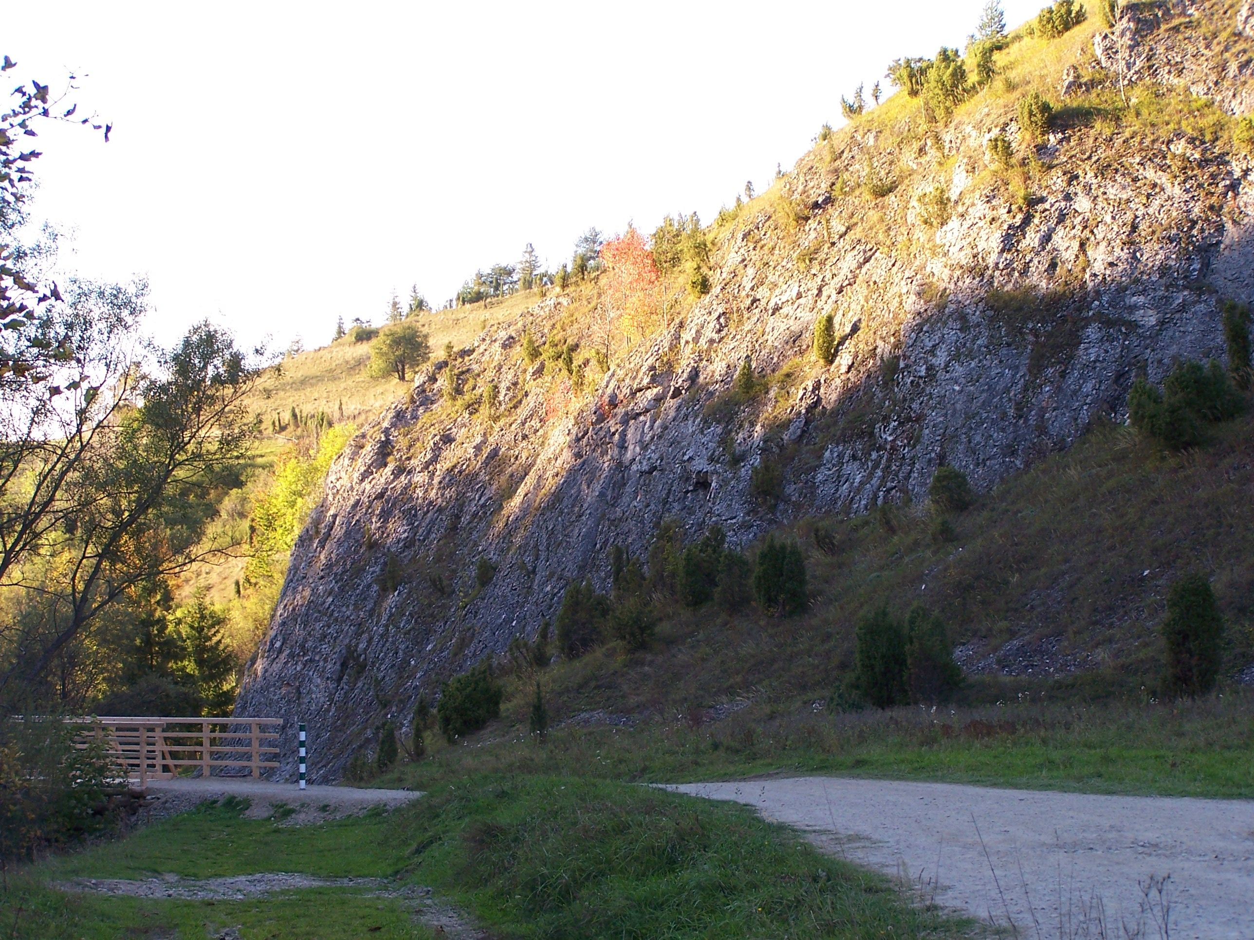 Wąwóz Międzyskały (Małe Pieniny)